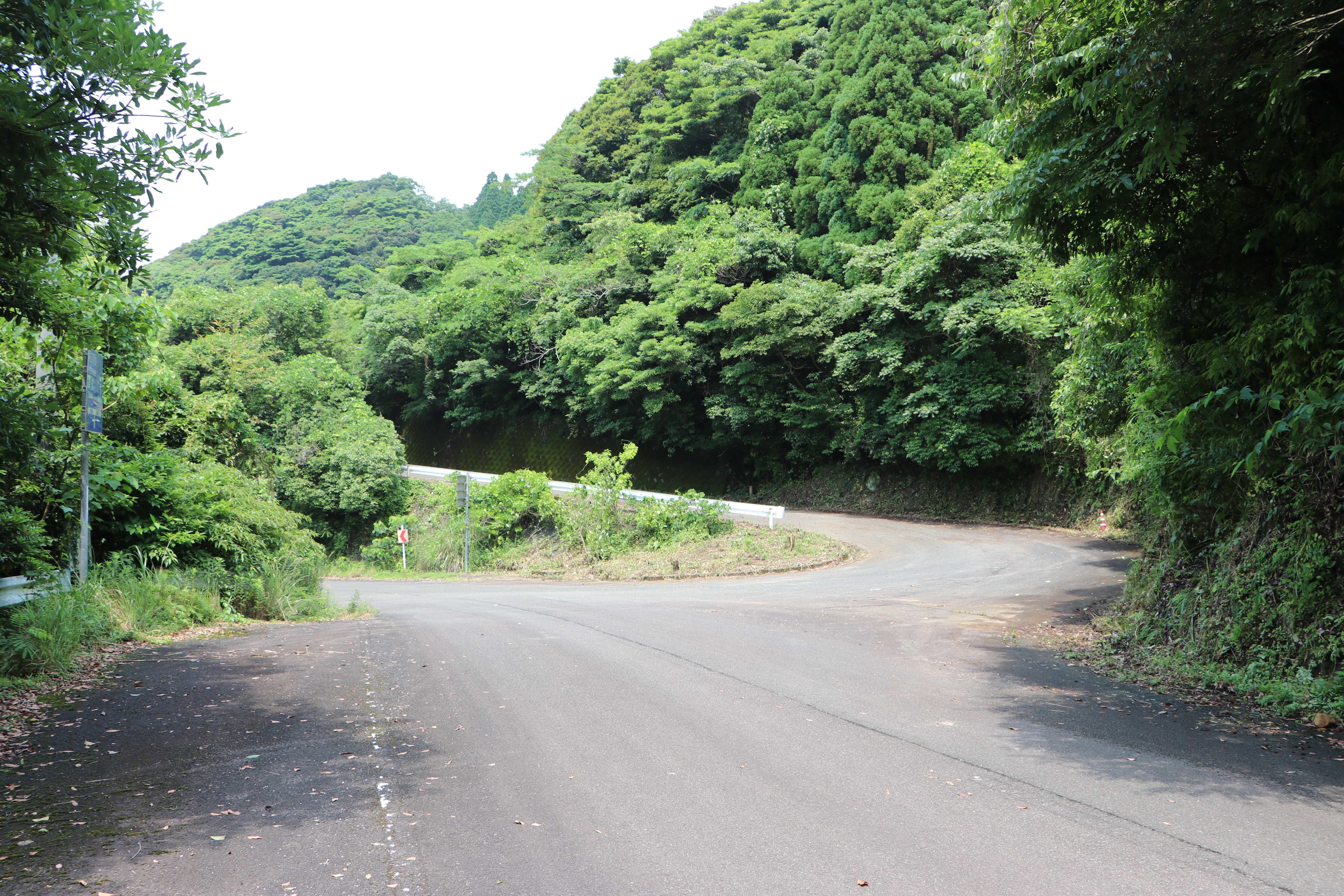 鹿児島県道270号久志上津貫線と鹿児島県道272号久志大浦線の交差点。 Canon EOS 80D